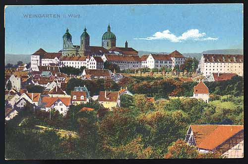 Weingarten. Gestamtansicht.